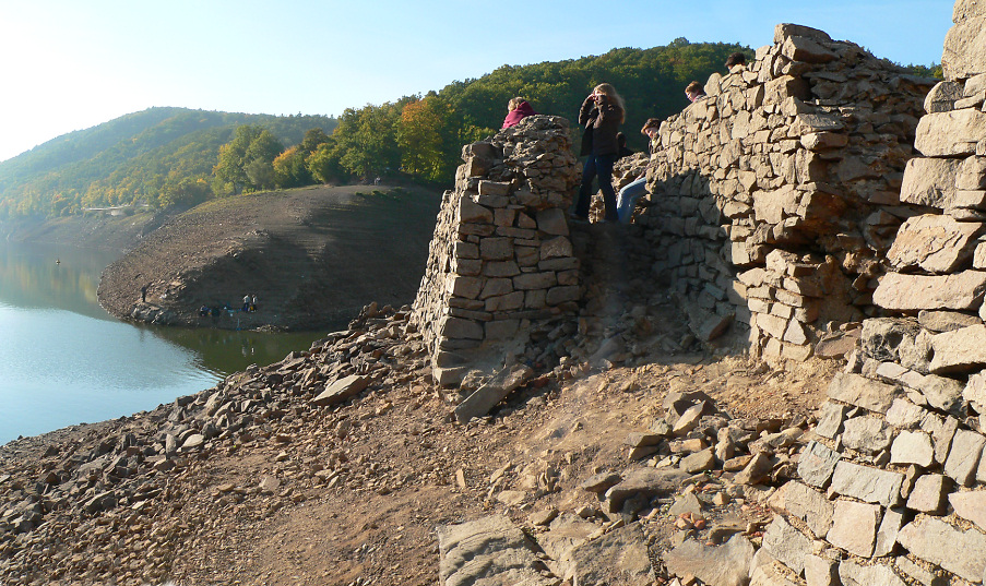 Reste von Berich